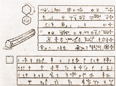 Славянскі разны каляндар. XVII ст.